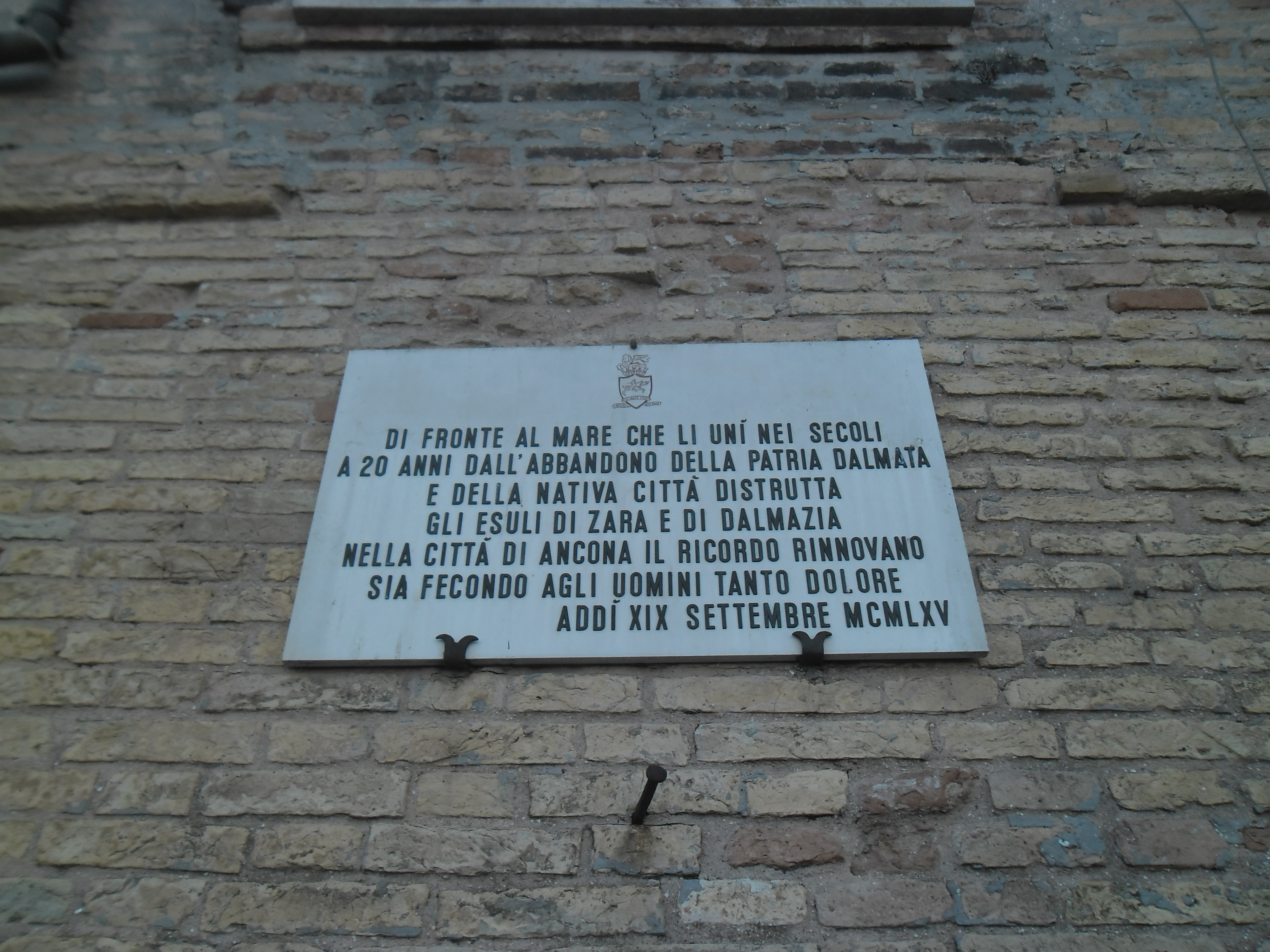 Ancona, Italija